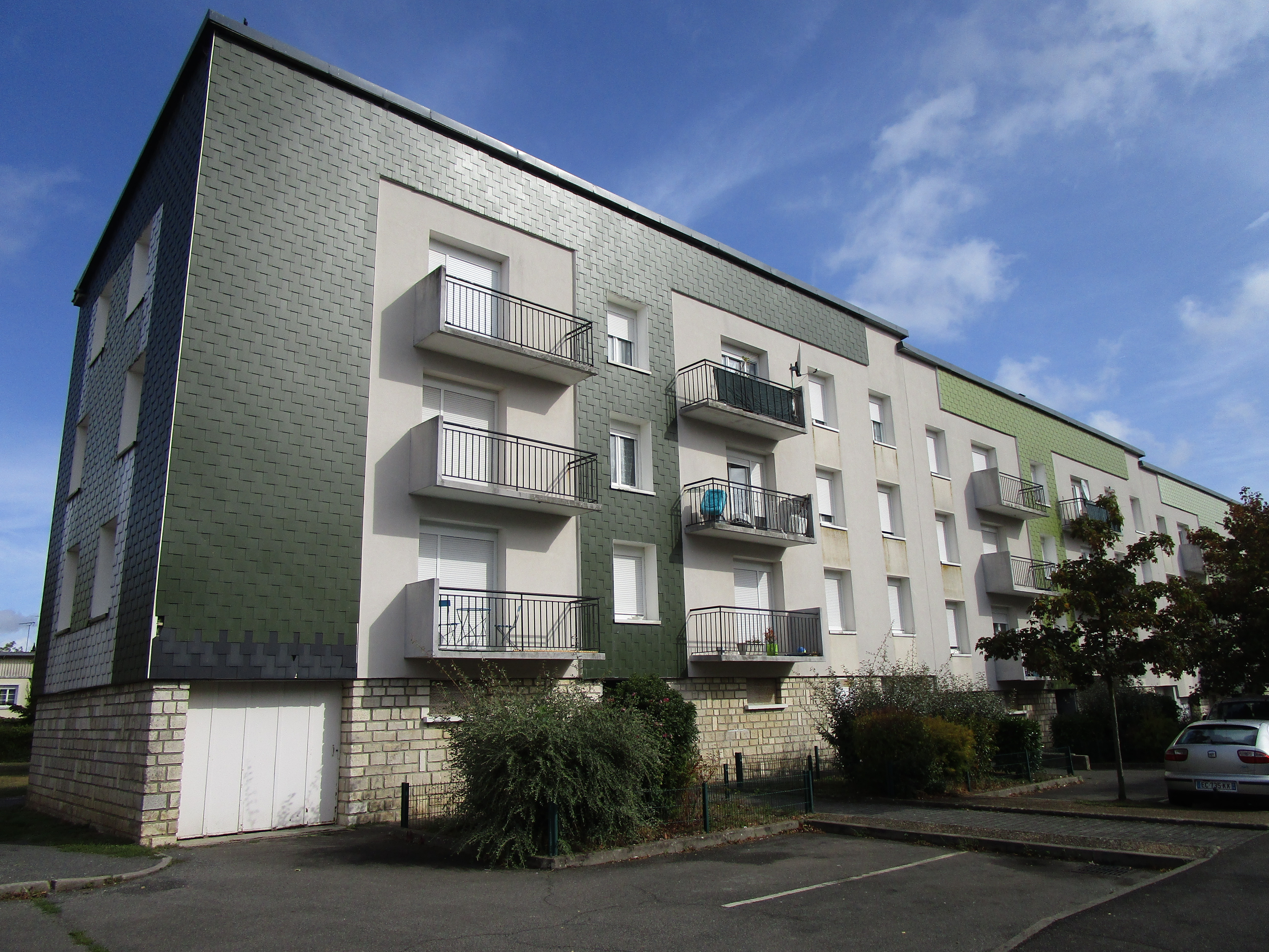 Immeuble rue du Maréchal Joffre, quartier de La Rabière, commune de Joué-lès-Tours.